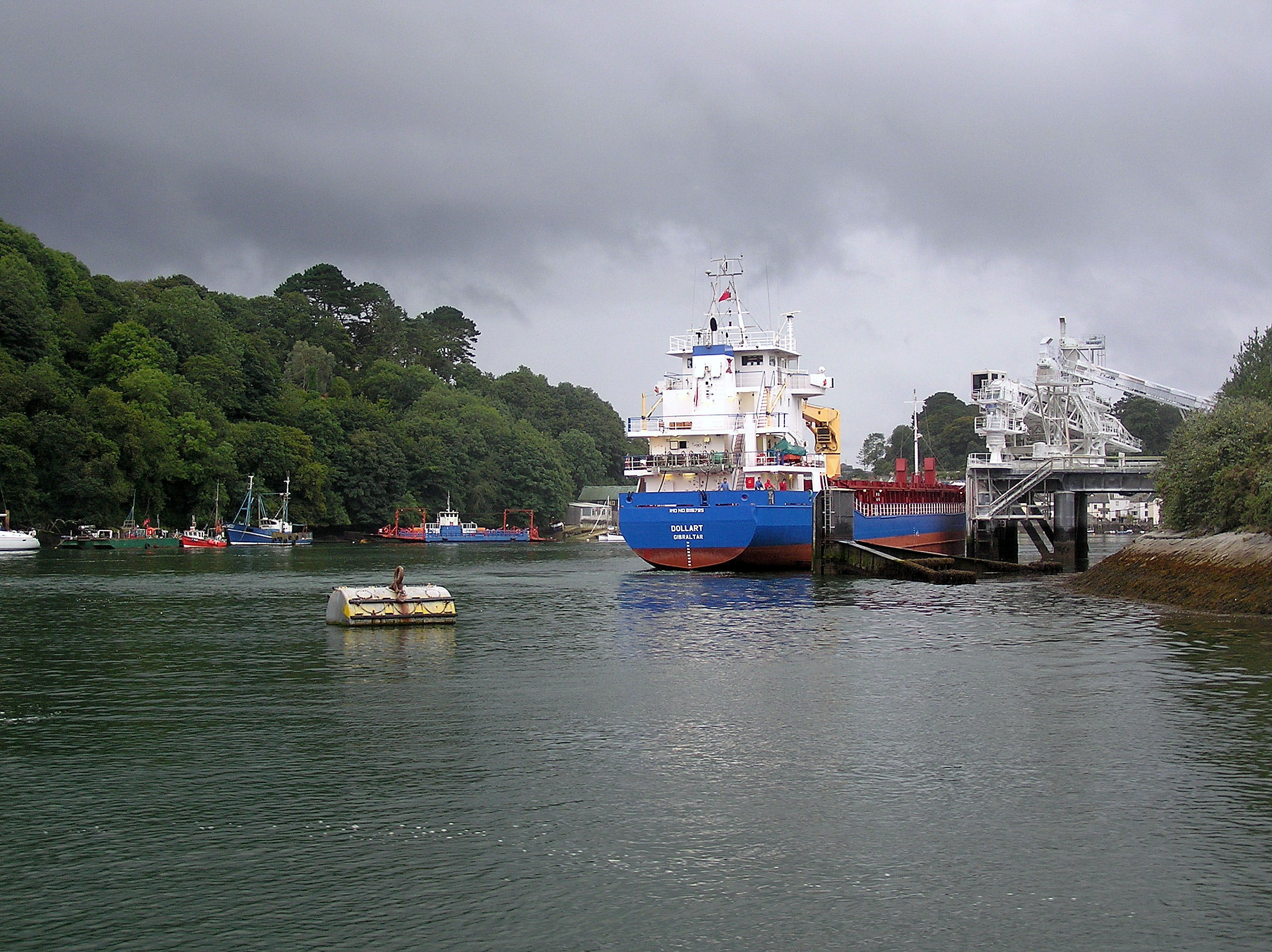 M/V Dollart IMO 9116785